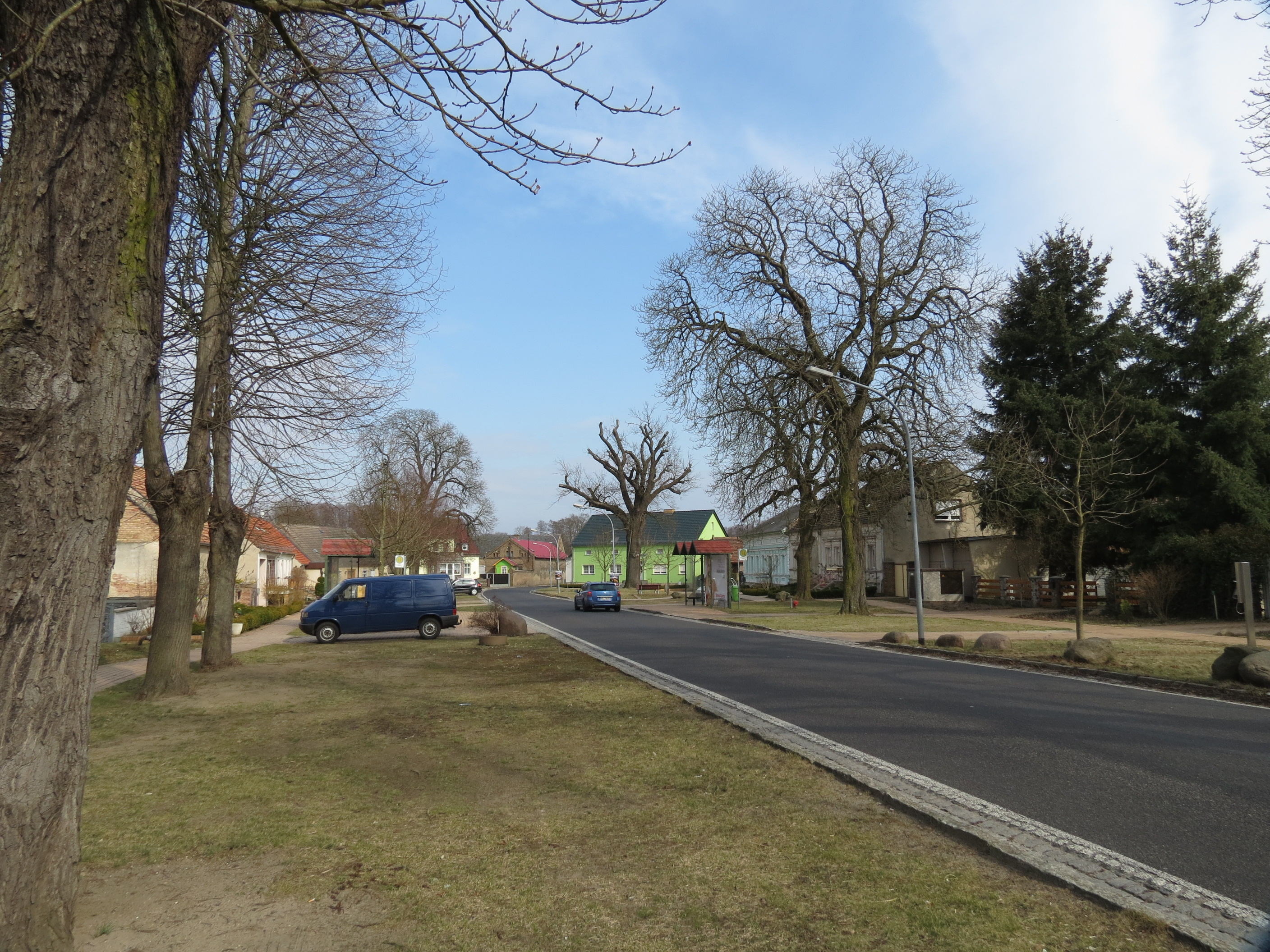 Klausdorf, Gem. Am Mellensee, Lkr. Teltow-Fläming, Brandenburg, Deutschland, Dorfaue, Blick nach Osten